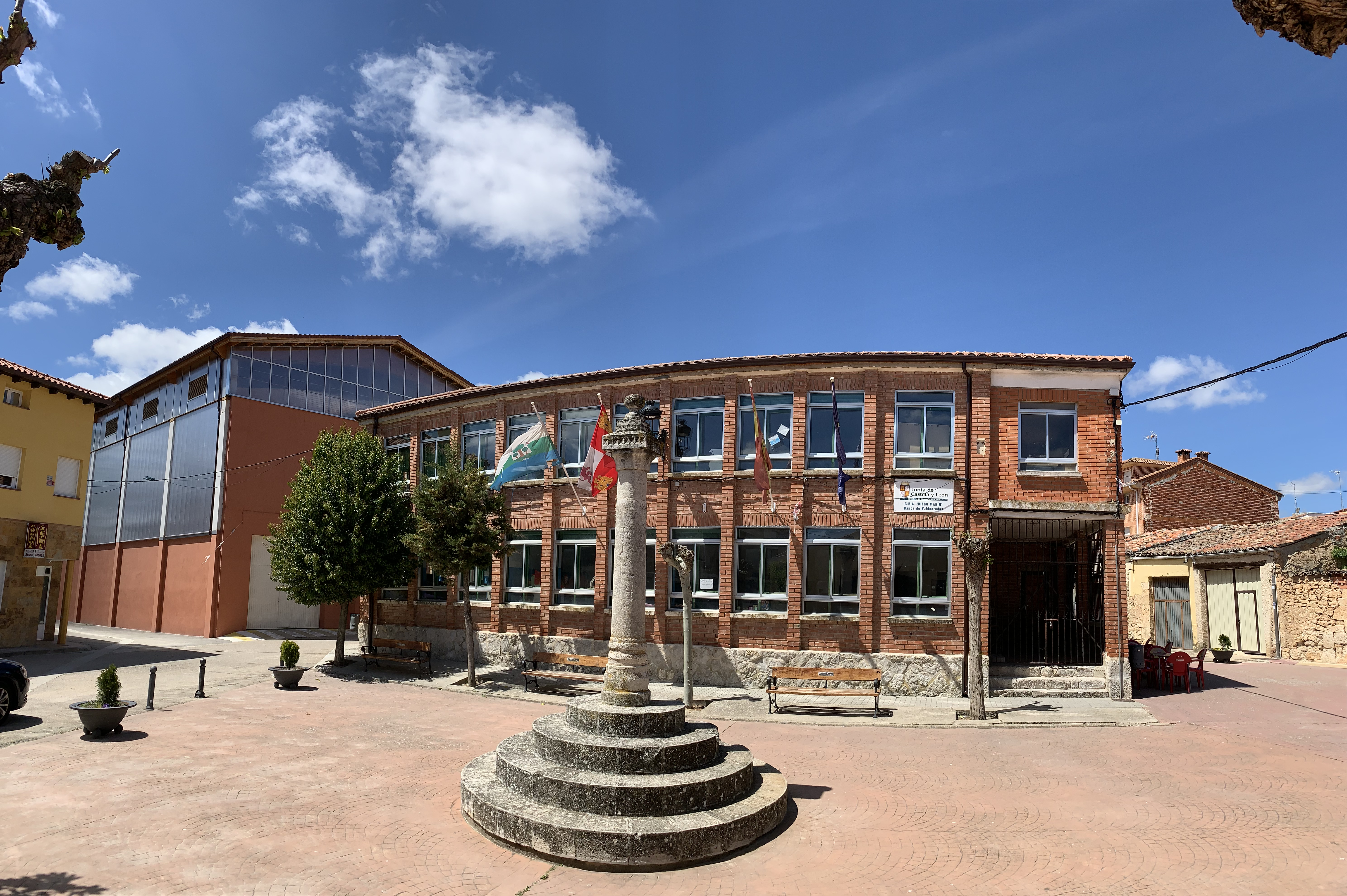 Baños de Valdearados